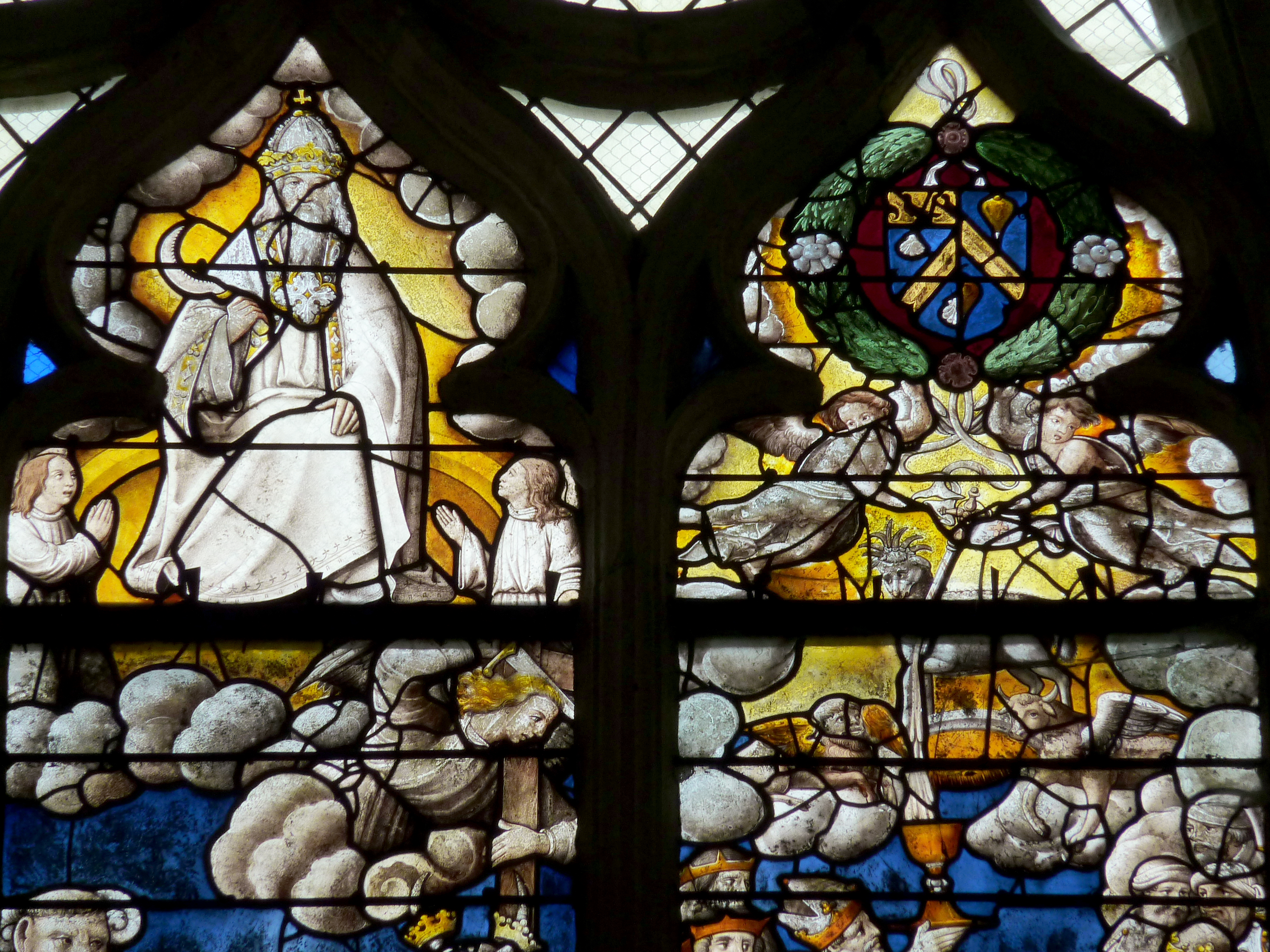 Katholische Kirche Saint-Georges in Chavanges im Département Aube (Champagne-Ardenne/Frankreich), Bleiglasfenster aus dem 16. Jahrhundert, Darstellung: Apokalypse, oberer Ausschnitt mit Wappen.